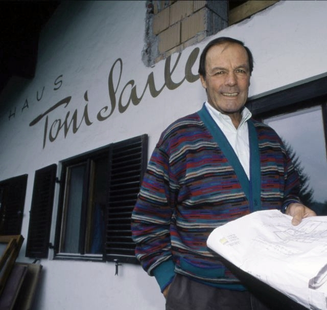 Toni Sailer, Österreichischer Skirennläufer und Schauspieler am 01.09.1998 vor seinem Haus in Kitzbühel (Österreich). Erstveröffentlichung der Fotografie in: Stern, ISSN: 0039-1239, Nr. 51/1998, S. 282: Was macht eigentlich Toni Sailer?